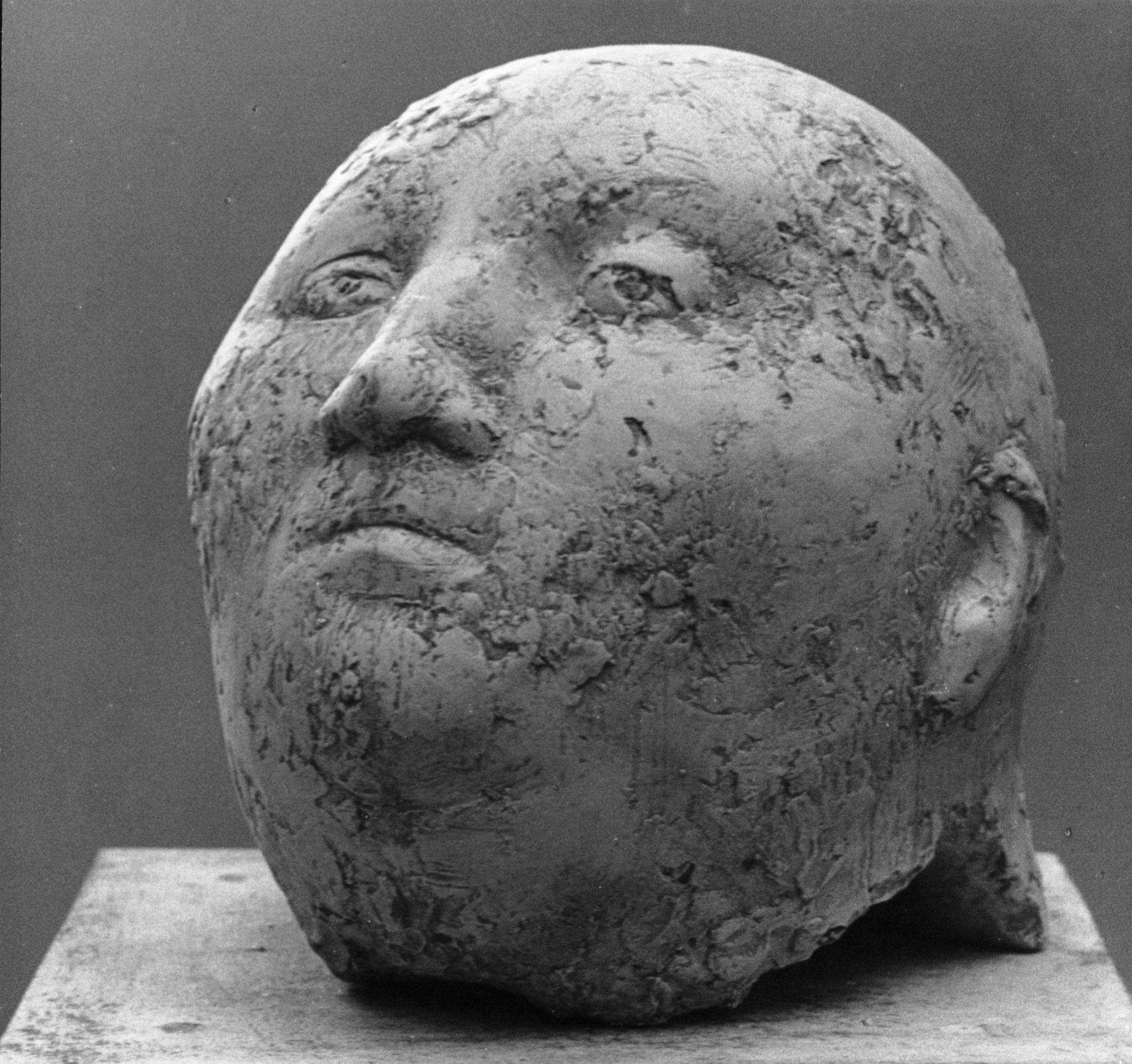 Gips für Bronze, Höhe 22cm